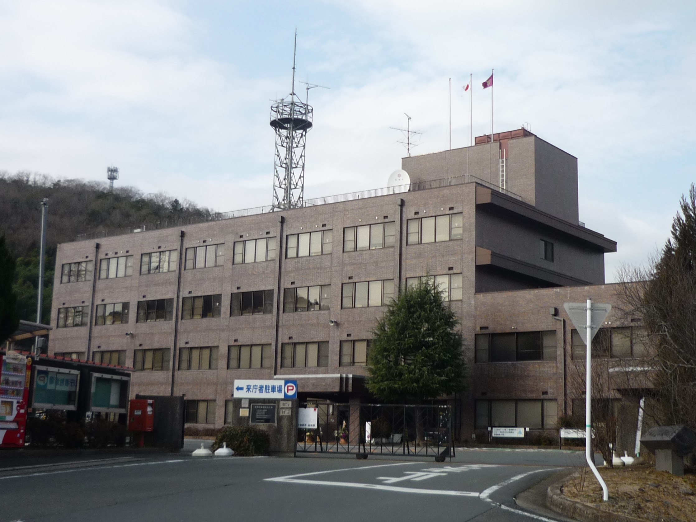 京都府園部総合庁舎 Panasonic Lumix DMC-FS3